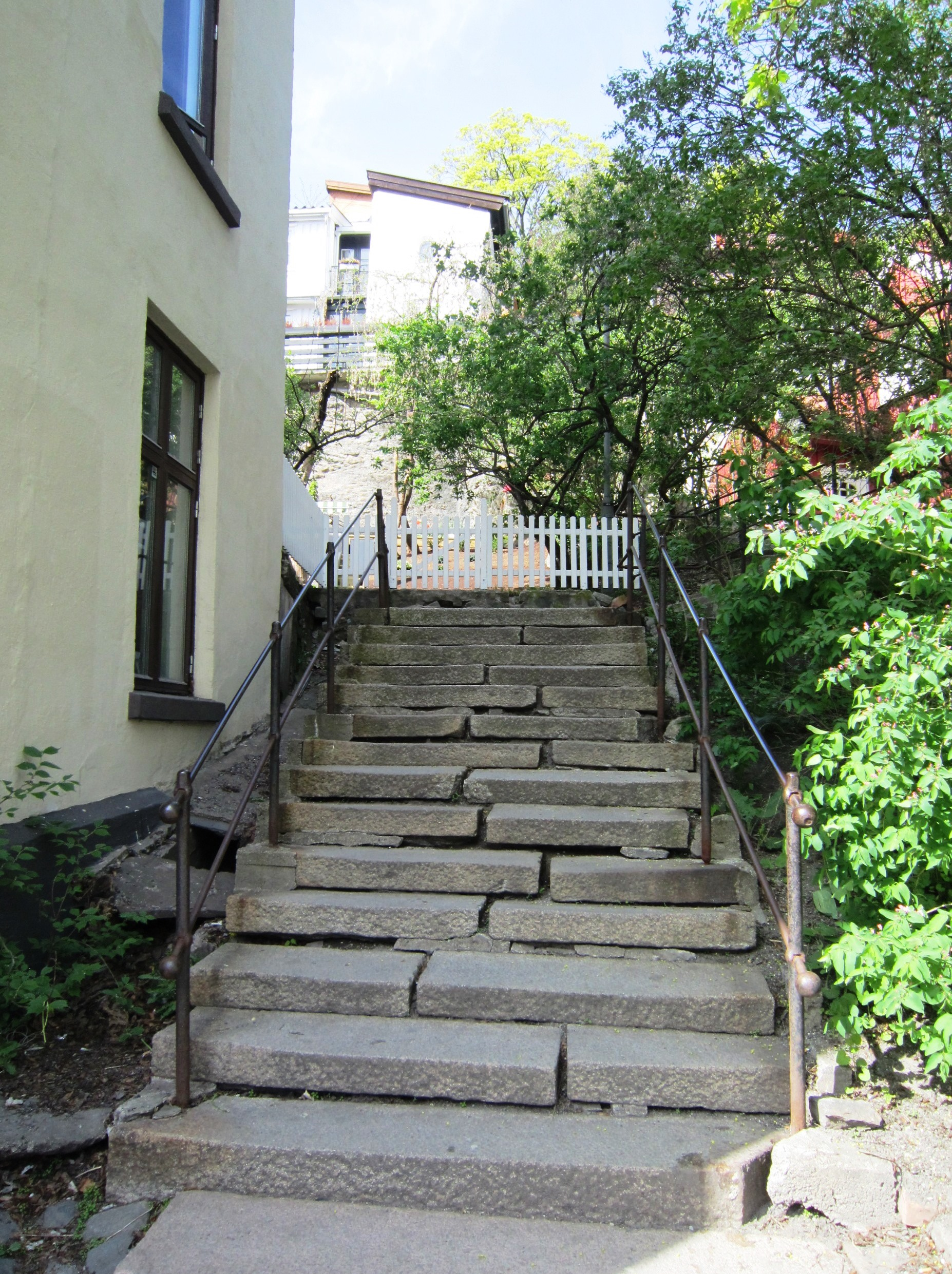 Øvre del av Rosteds gate i Oslo